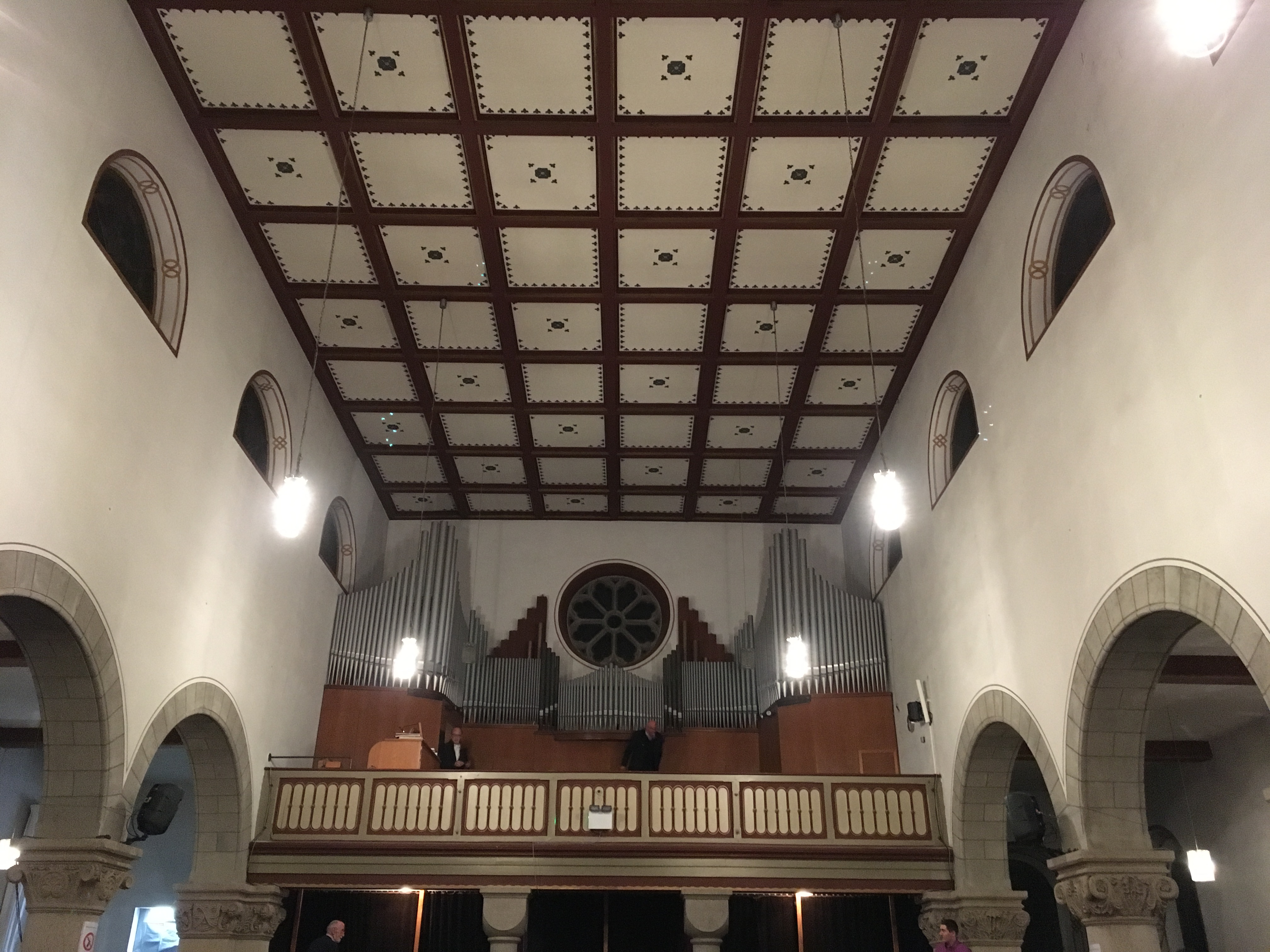 Pfarrkirche St. Hubertus in Rieden, Rheinland-Pfalz, aufgenommen während der Passionsspiele